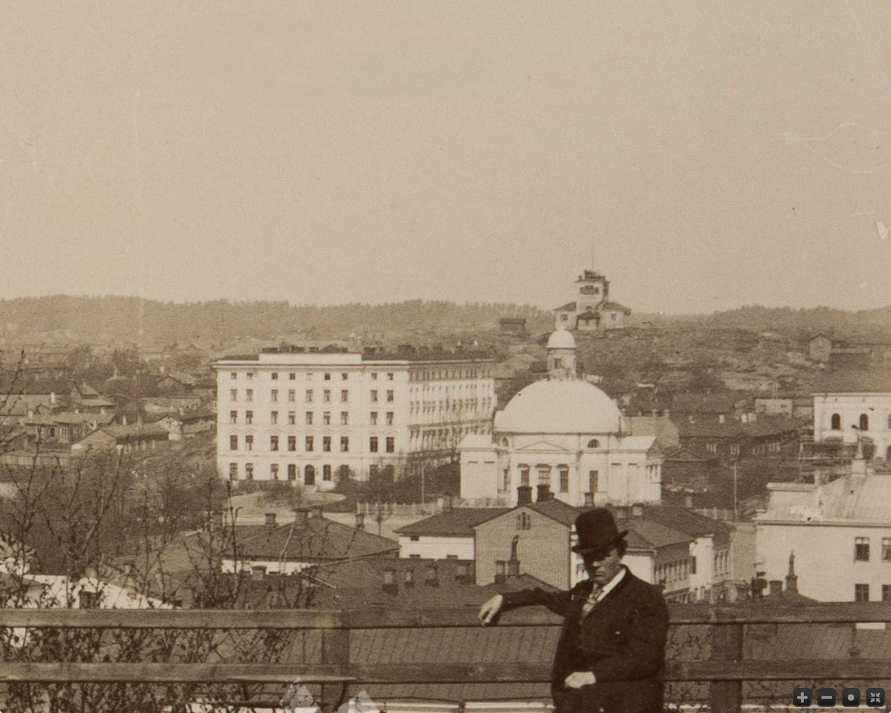 Samppalinnan mäki 1880-luvulla